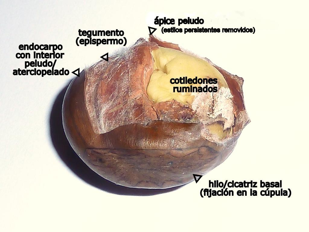 Castanea sativa (Castaño) : Anatomía del aquenio abierto pro. parte - Comercio, Madrid (España).